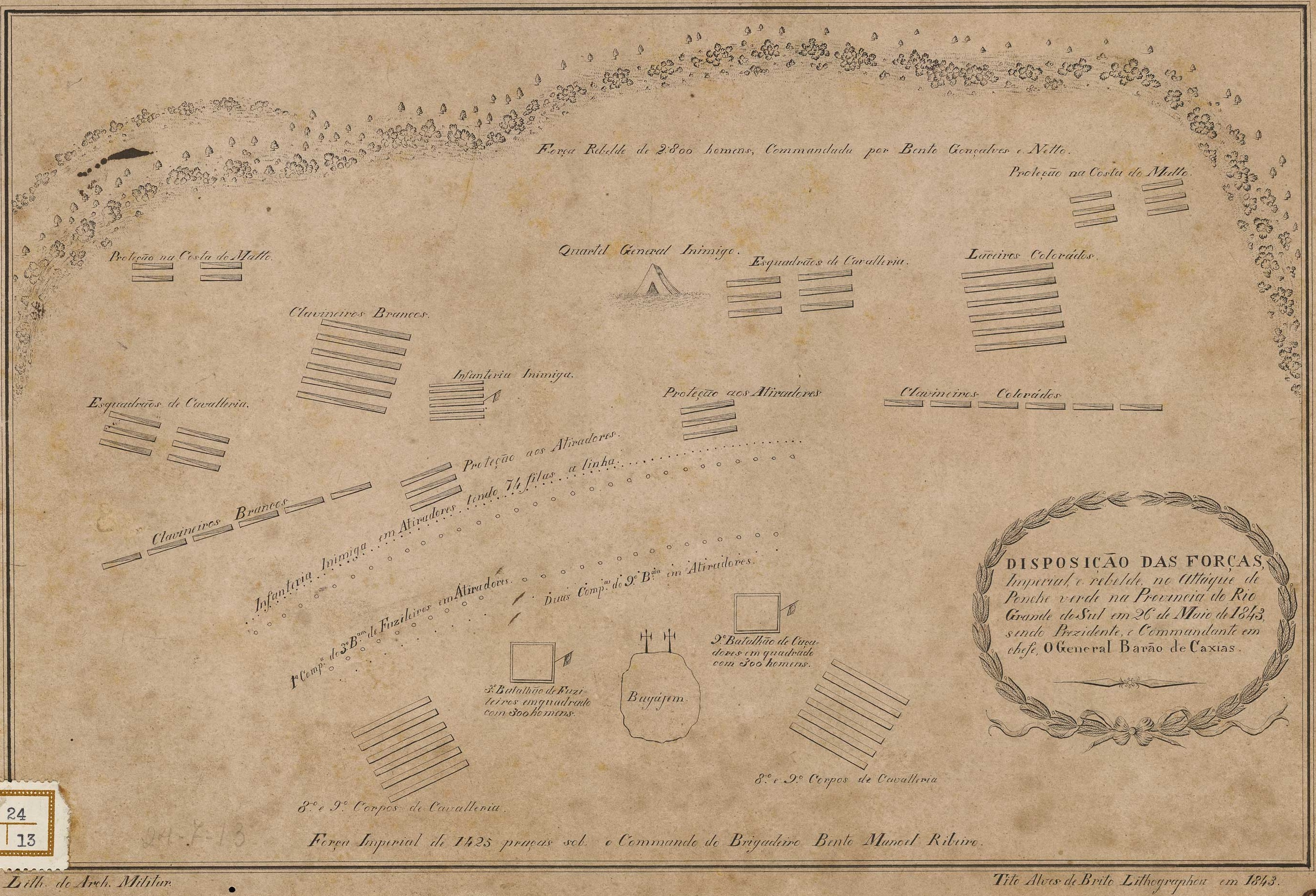 "Disposição da forças imperial e rebelde, no attáque de Ponche Verde na Provincia do Rio Grande do Sul em 26 de maio de 1843 [Cartográfico] : sendo prezidente e comandante em chefe o General Barão de Caxias".